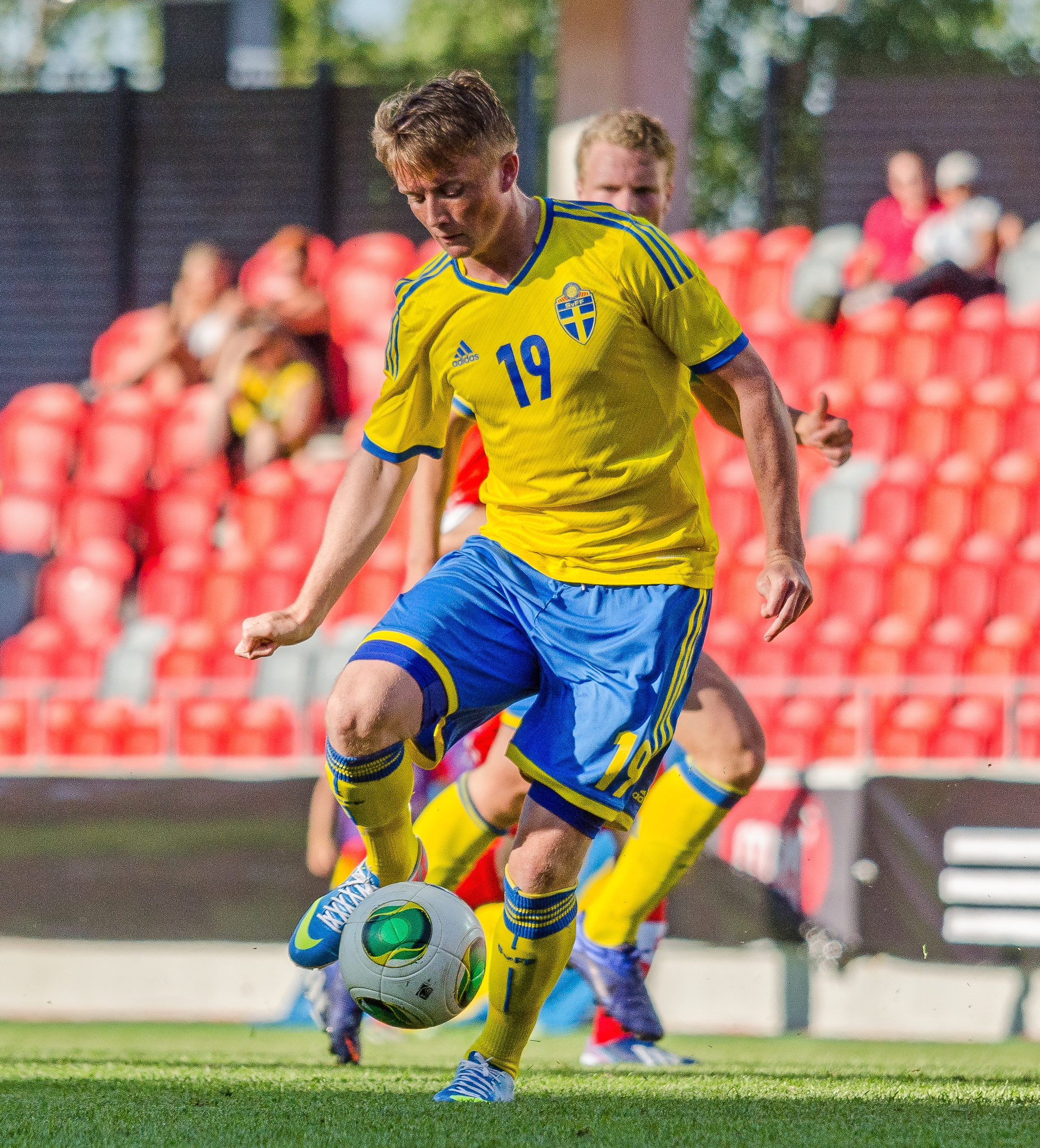 Anfallaren Sam Larsson i det svenska U21-landslagets 3-2 seger mot Schweiz i en träninglandskamp på Myresjöhus Arena i Växjö, 6/6 2013.